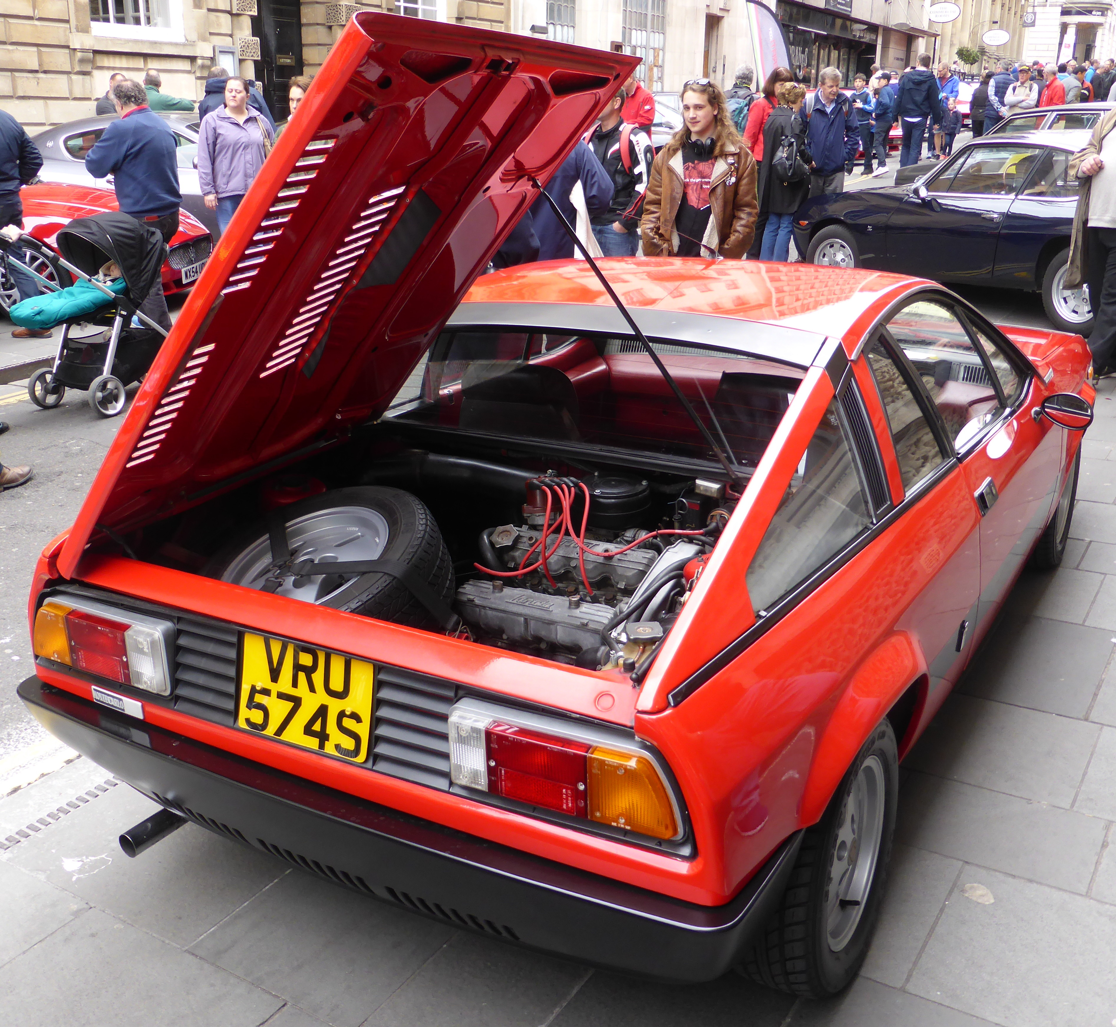 Bristol Italian AutoMoto Festival